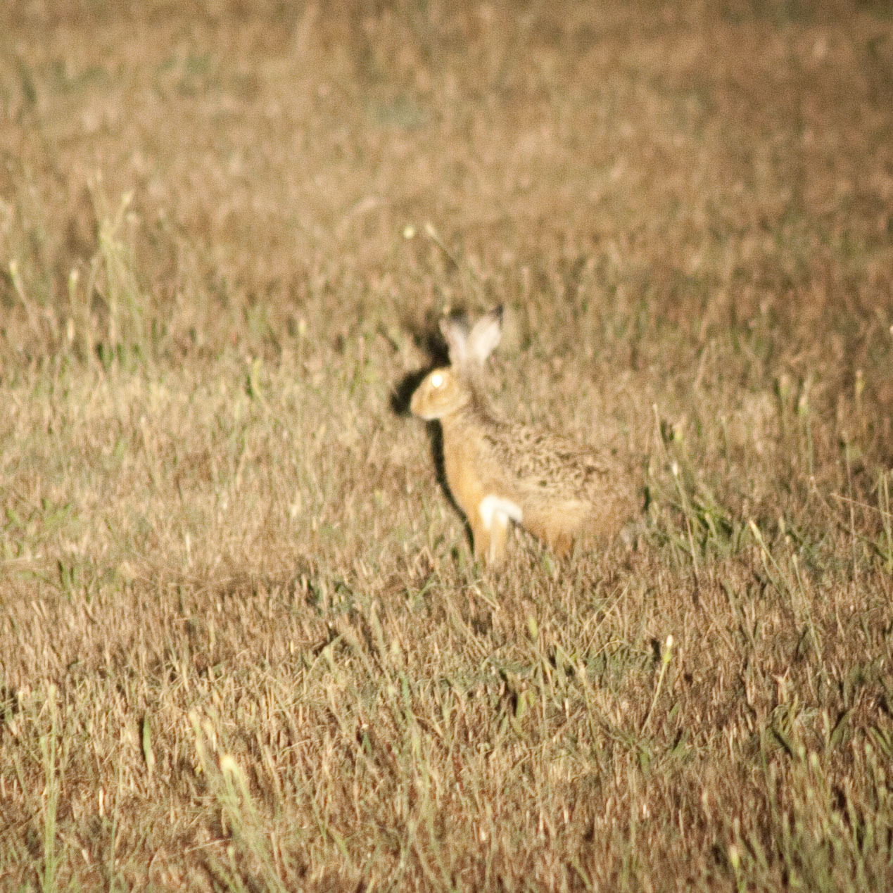 Marco Scalisi 2007 Opera propria Lepre italica nella R.N.R. Monterano (RM) ©